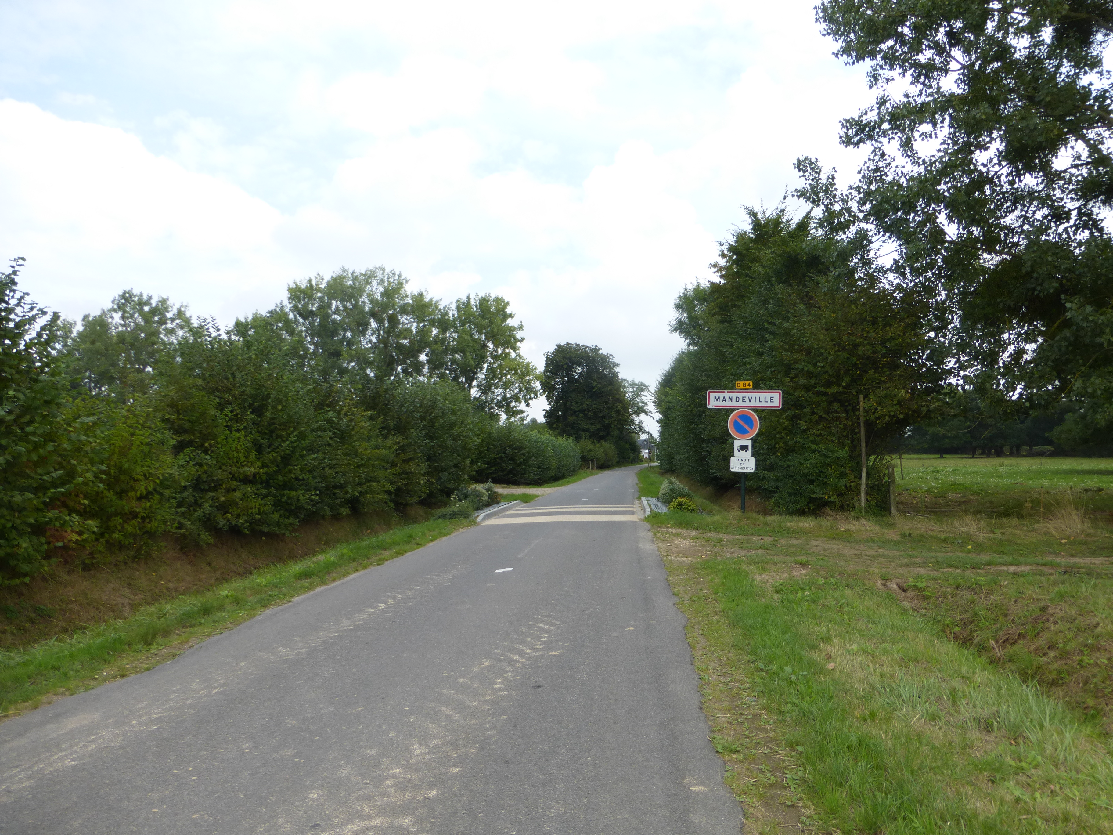 MANDEVILLE Entree village